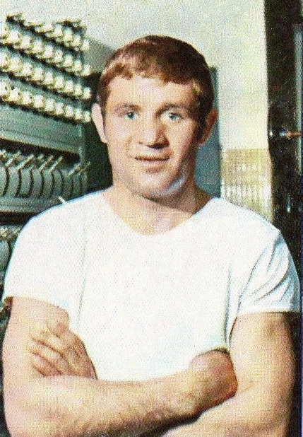 CAMPIONI dello SPORT 1969/70-n.359- JOSSELIN - FRANCIA -PUGILATO